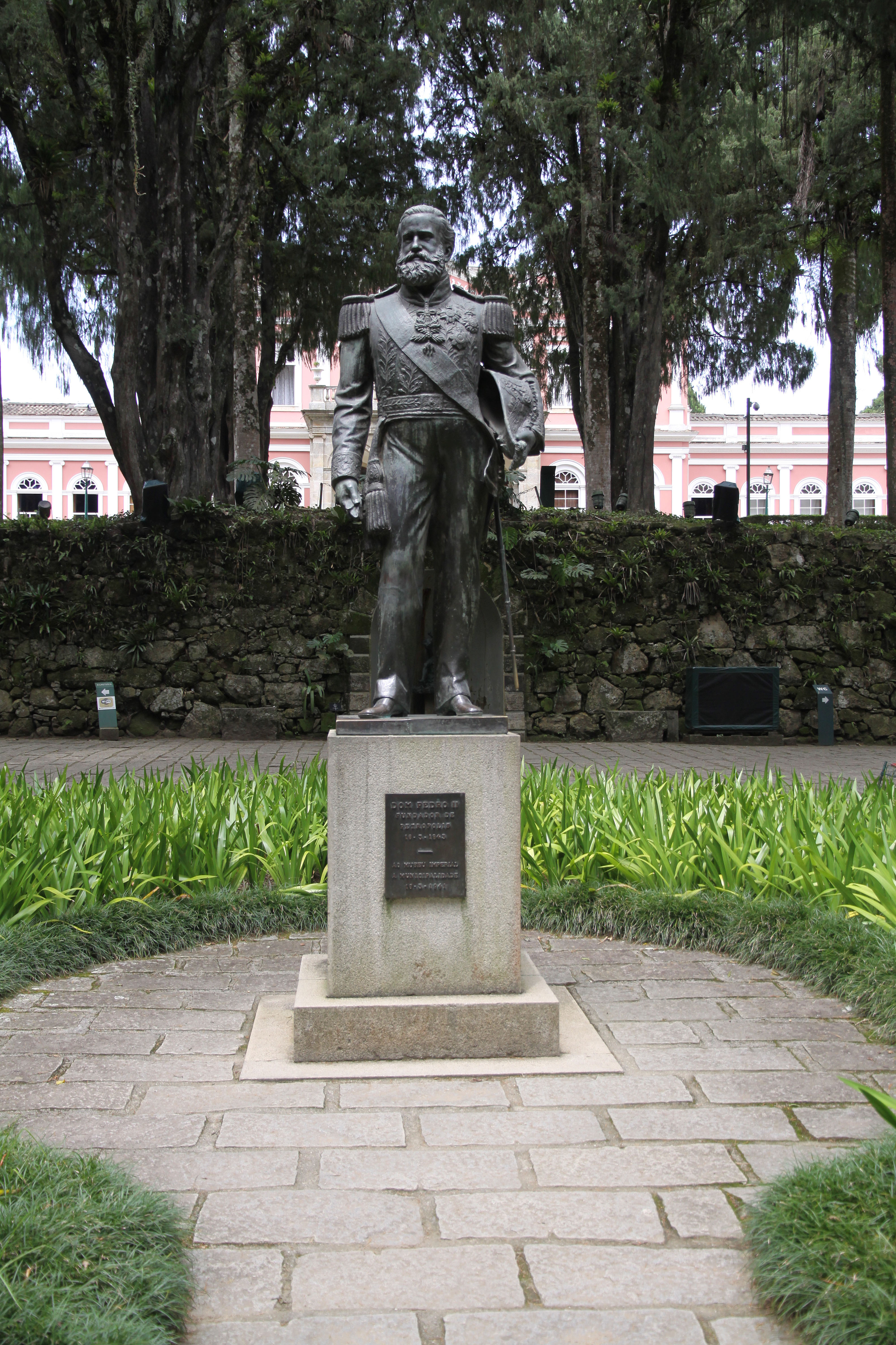 Monumento a Dom Pedro II no Museu Imperial em Petrópolis